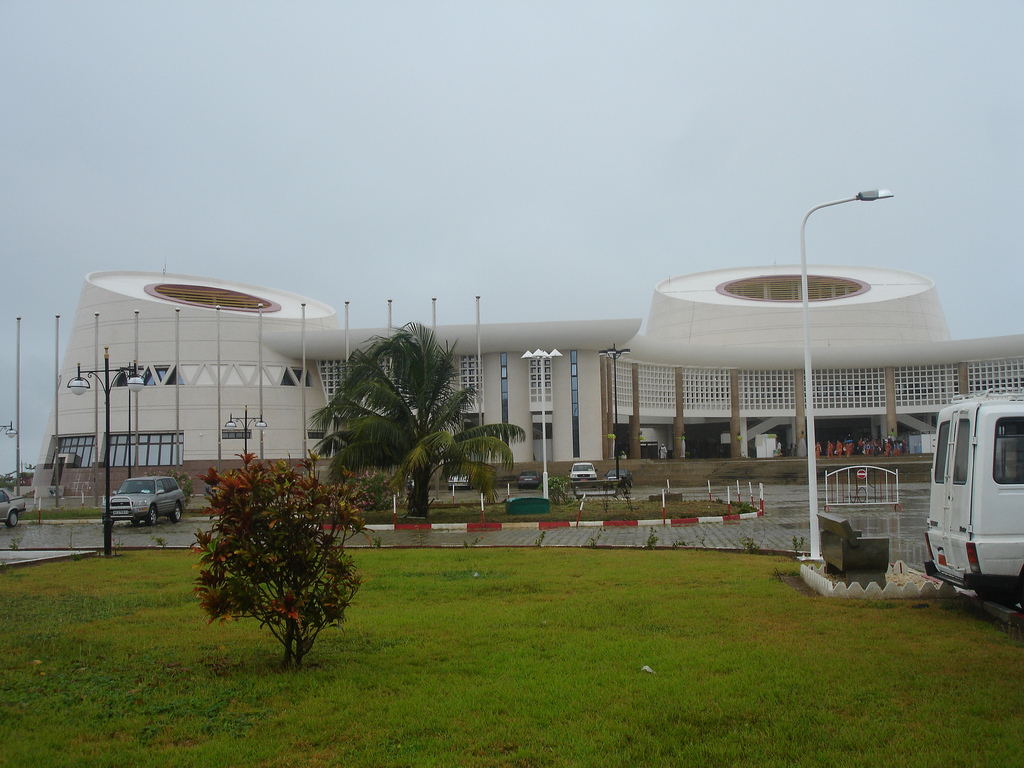 Convention center (Conference center and shows), Cotonou, Benin. ("Palais des Congrès de Cotonou")